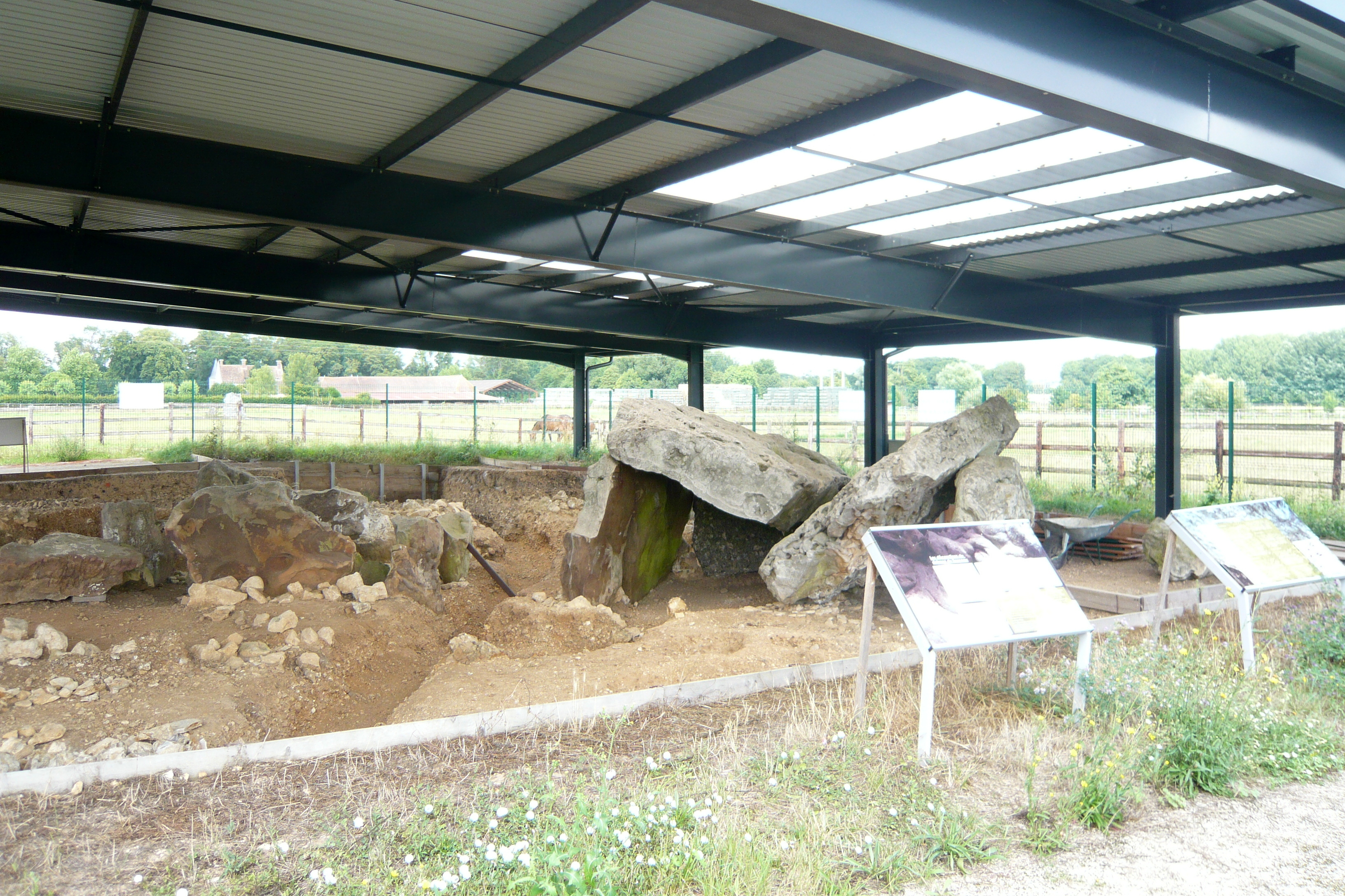 Dolmens du Berceau et Léon Petit, Changé, Saint-Piat, Eure-et-Loir (France).